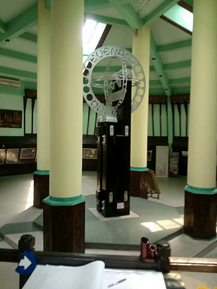 Miniatur Tugu Khatulistiwa.